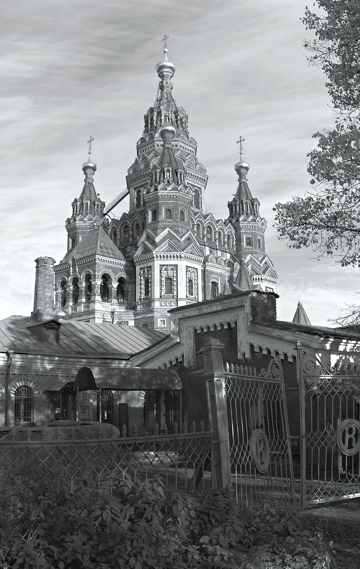 Собор петра и павла (Санкт-Петербург и Лен.область, Петергоф, красный пр. (быв. с-петербургская улица ), 32)